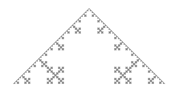 Quadratic von Koch fractal.